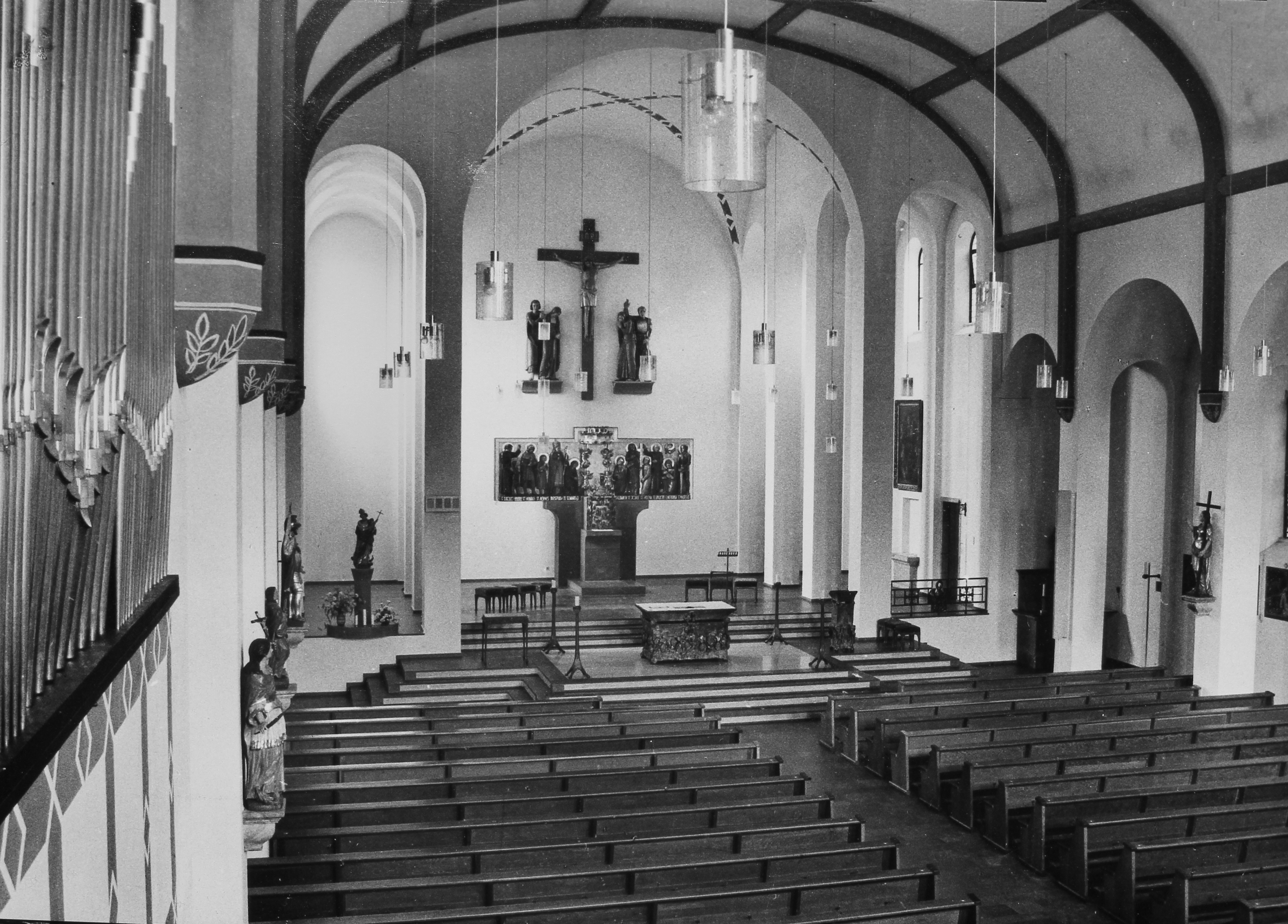 Pfarrkirche St. Mauritius Kärlich, Chor und Langhaus nach der Umgestaltung 1976